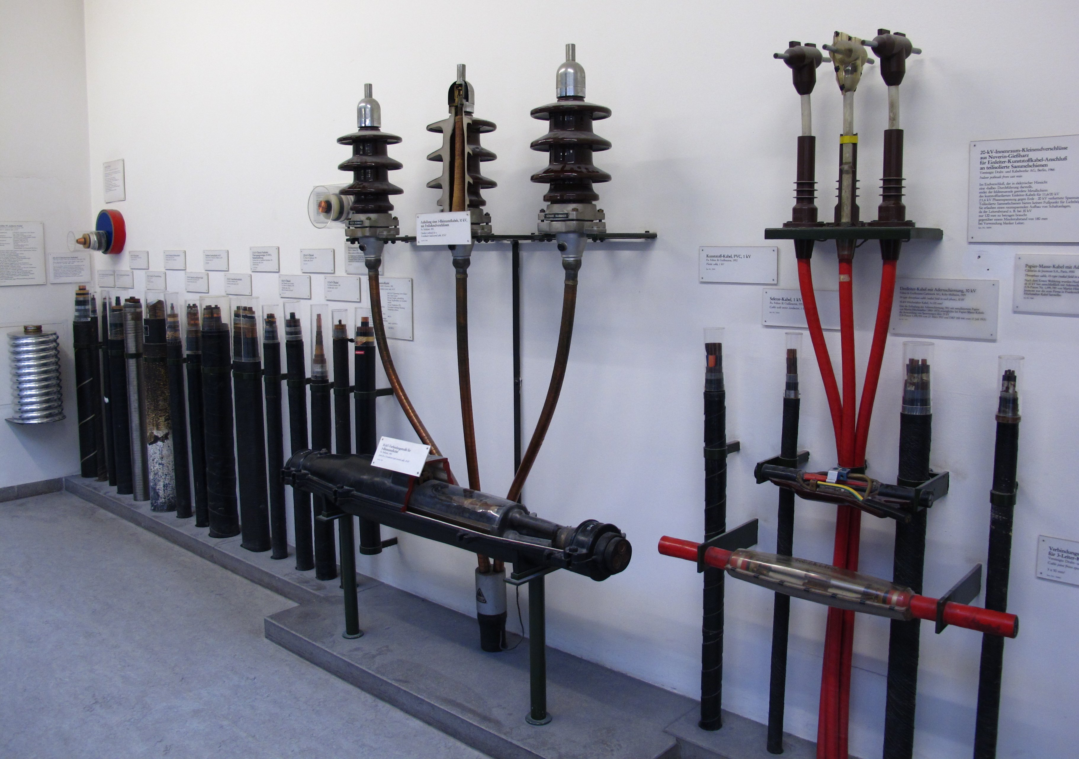 Verschiedene Hochspannungskabel, Kabelendverschlüsse und Kabelmuffen.